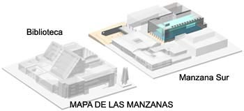 Complejo cultural del Banco de la República, del cual es parte la Biblioteca Luis Ángel Arango, en Bogotá. Creado por en abril de 2006.